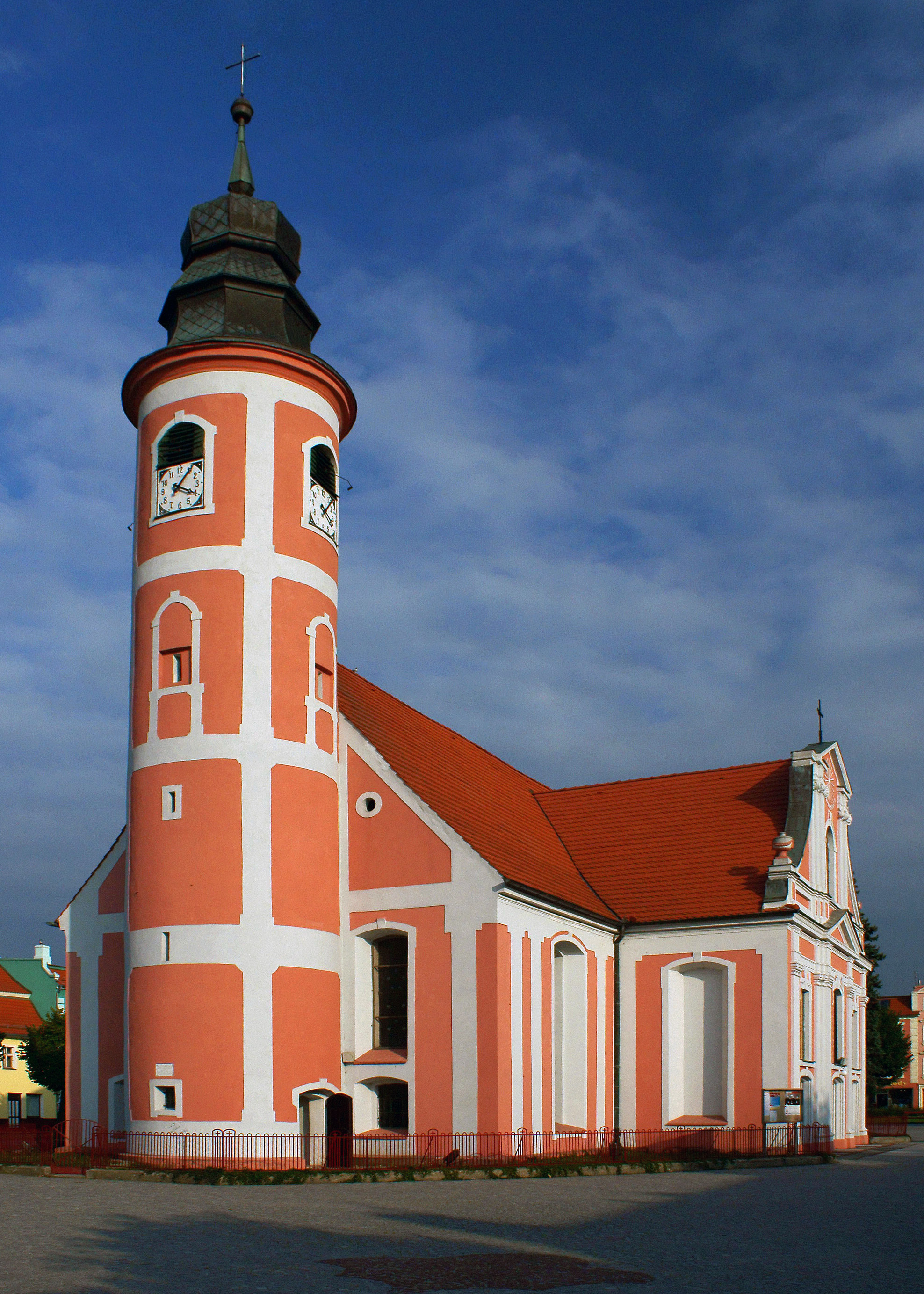 Chocianów - Kościół pomocniczy św. Józefa Robotnika (d. Najświętszego Serca PJ)